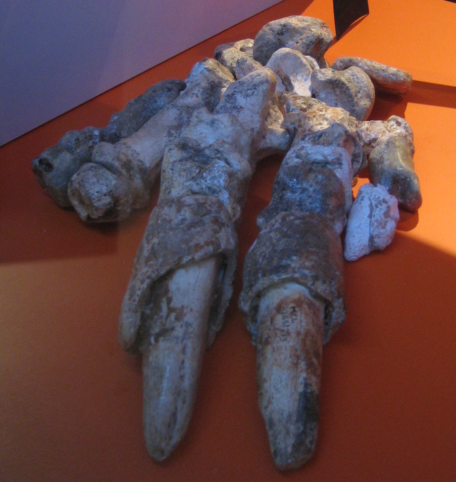 Catonyx cuvieri in CosmoCaixa, Barcelona